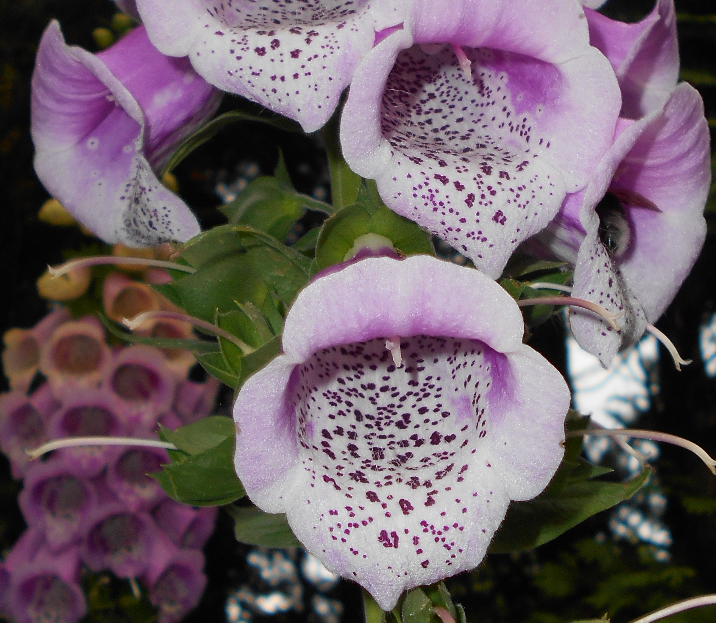 Naparstnica purpurowa (Digitalis purpurea), Ogród Botaniczny UMCS w Lublinie.